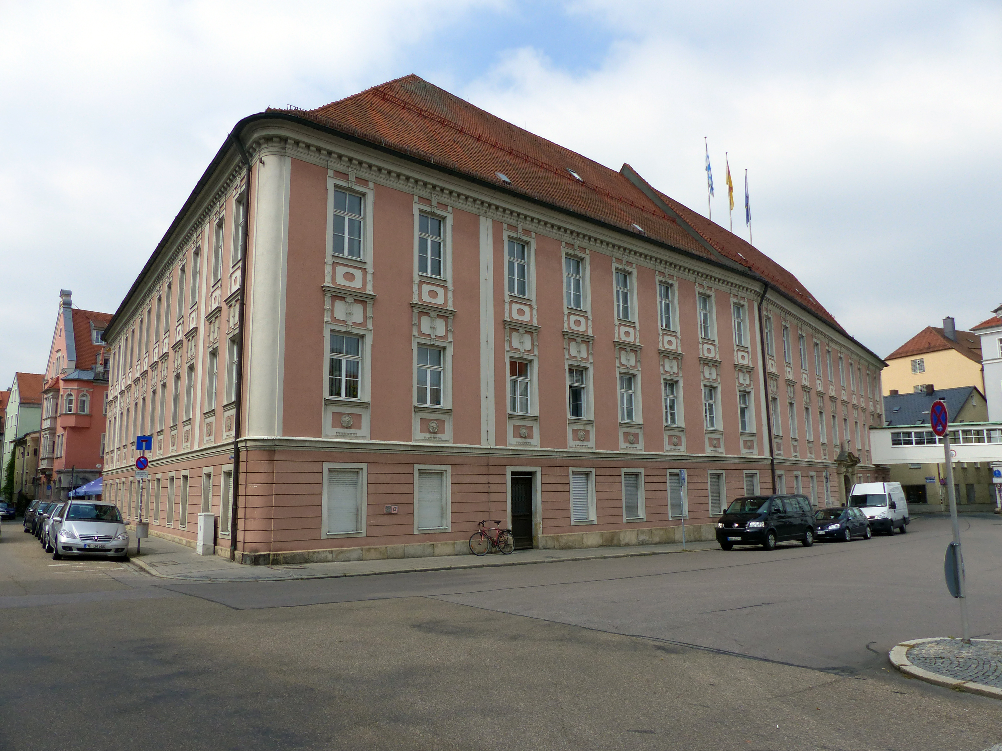 Denkmalgeschütztes Verwaltungsgebäude, Emmeramsplatz 8, RegensburgThis is a photograph of an architectural monument.